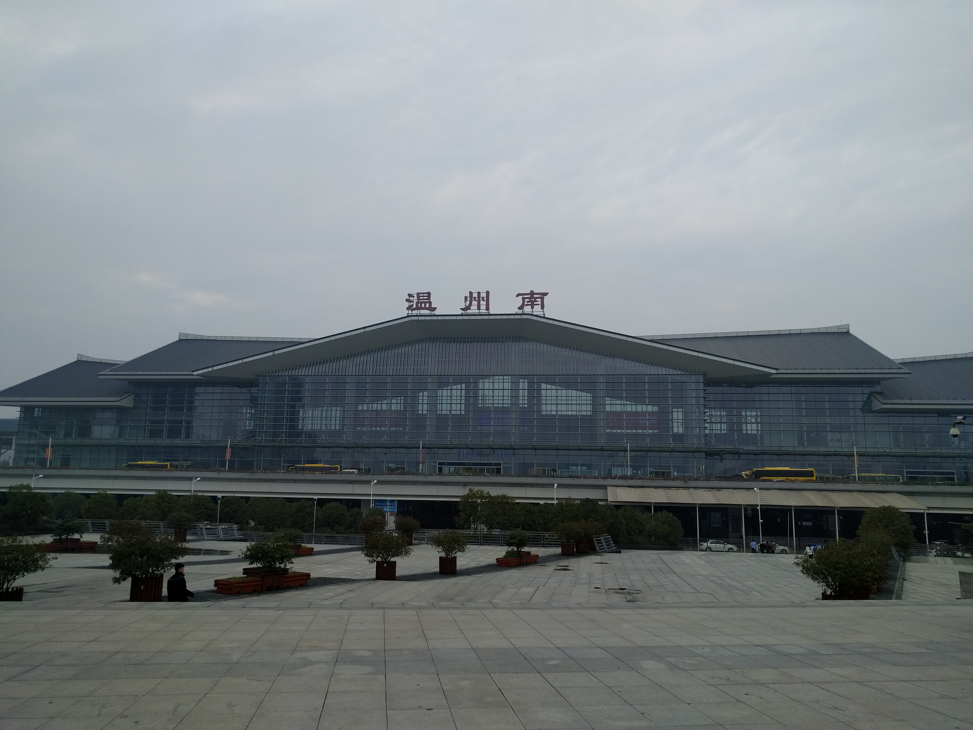 中文（中国大陆）: 火车温州南站